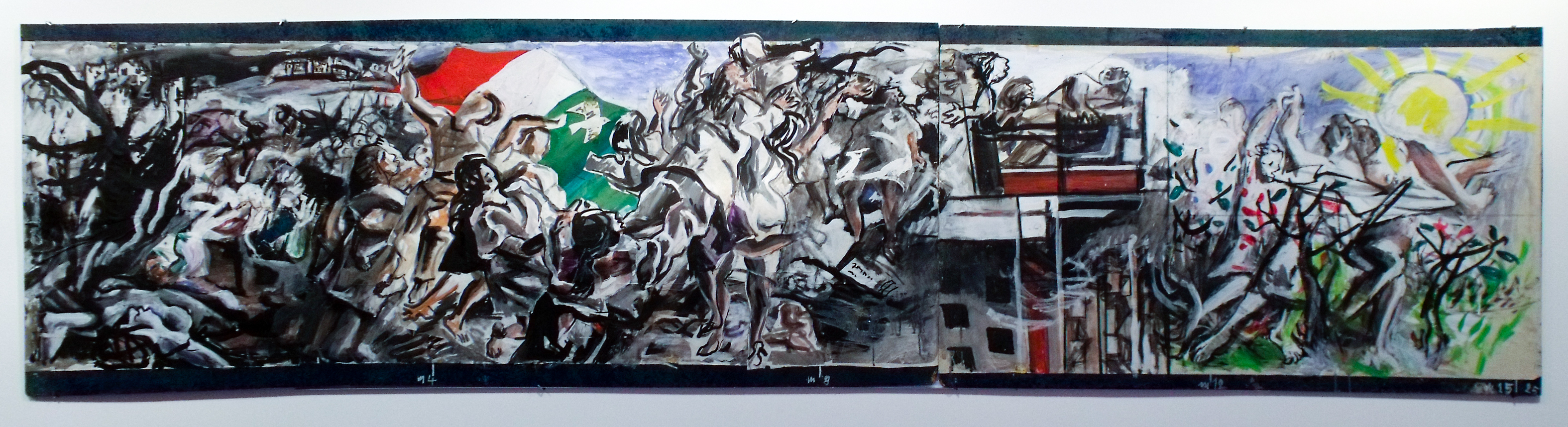 Bozzetto preparatorio del dipinto murale della Sala Consiliare del Comune di L'Aquila ad opera del maestro Fulvio Muzi.